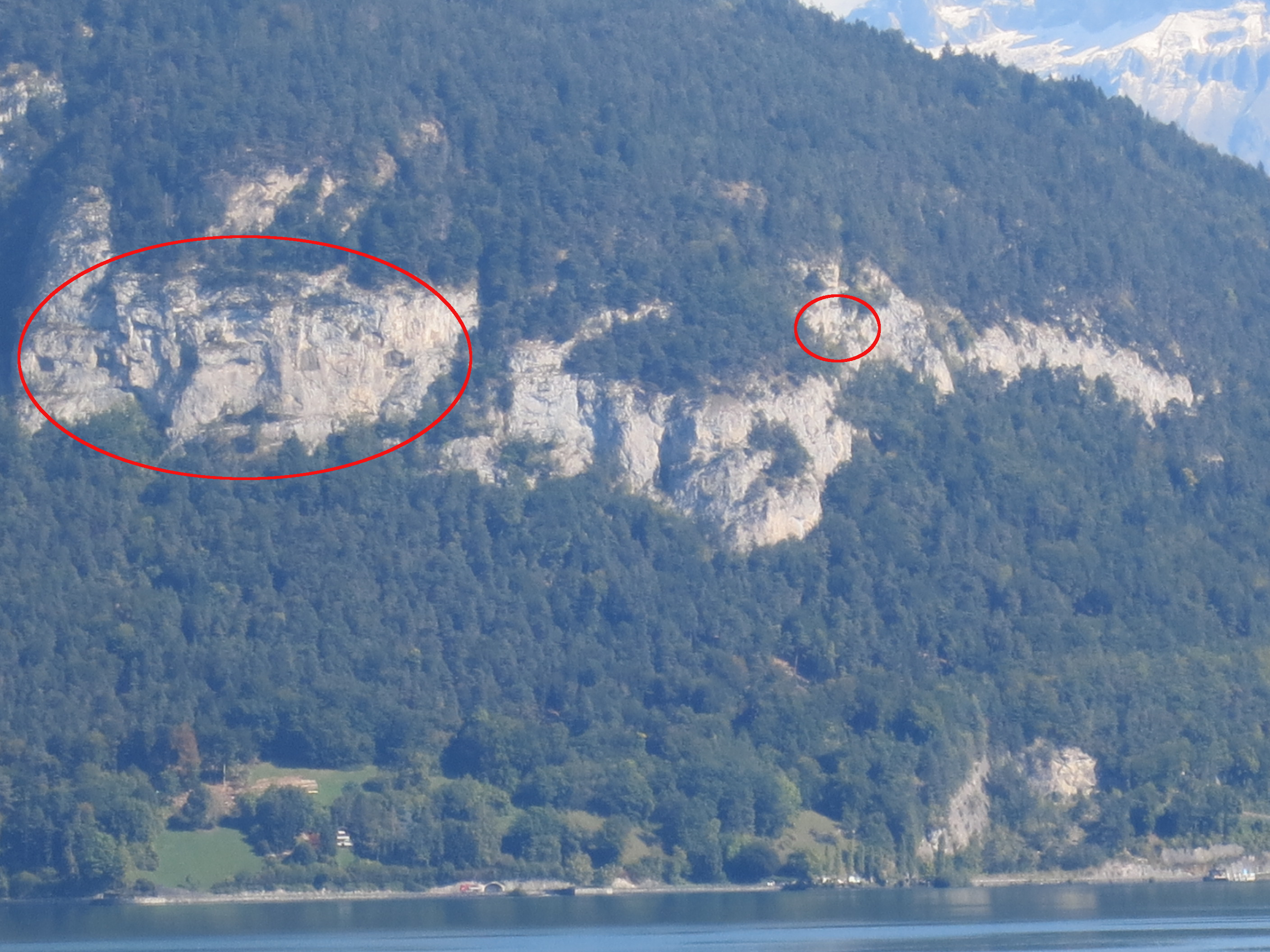 Artilleriewerk Schmockenfluh, Beatenberg BE, Schweiz